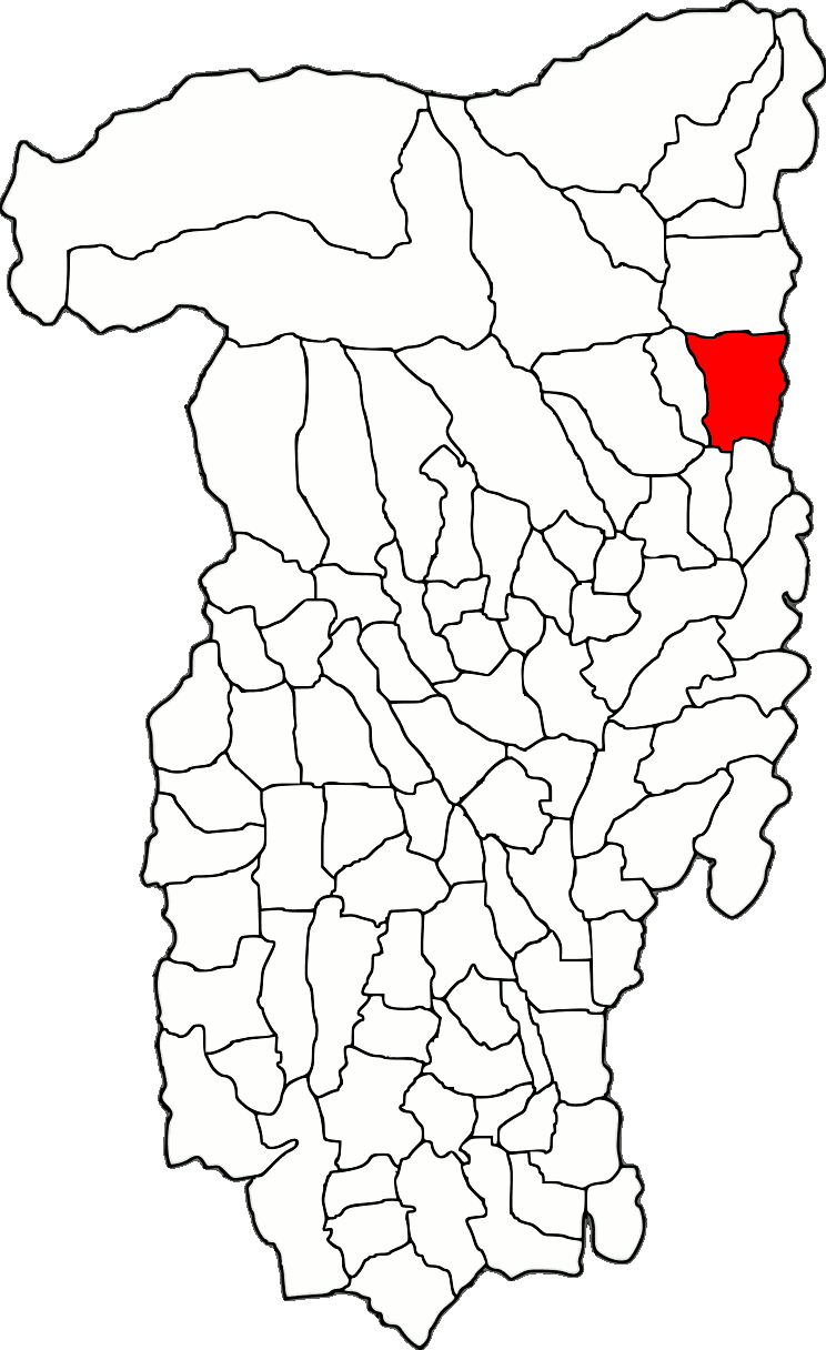 Lage der Gemeinde Berislăvești im Kreis Vâlcea (RO).